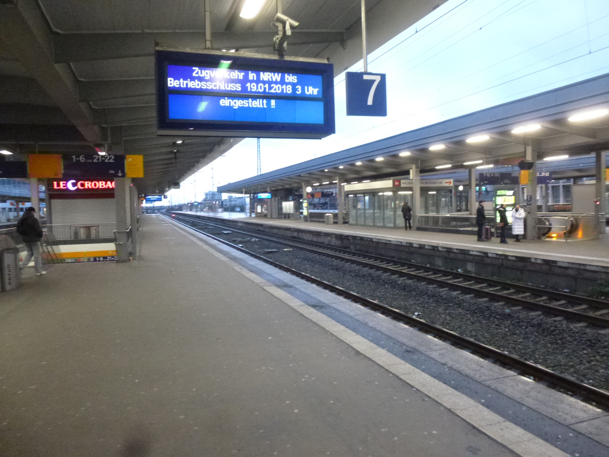 Essen Hauptbahnhof Orkan Friederike 18. Januar 2018 17:00 Uhr